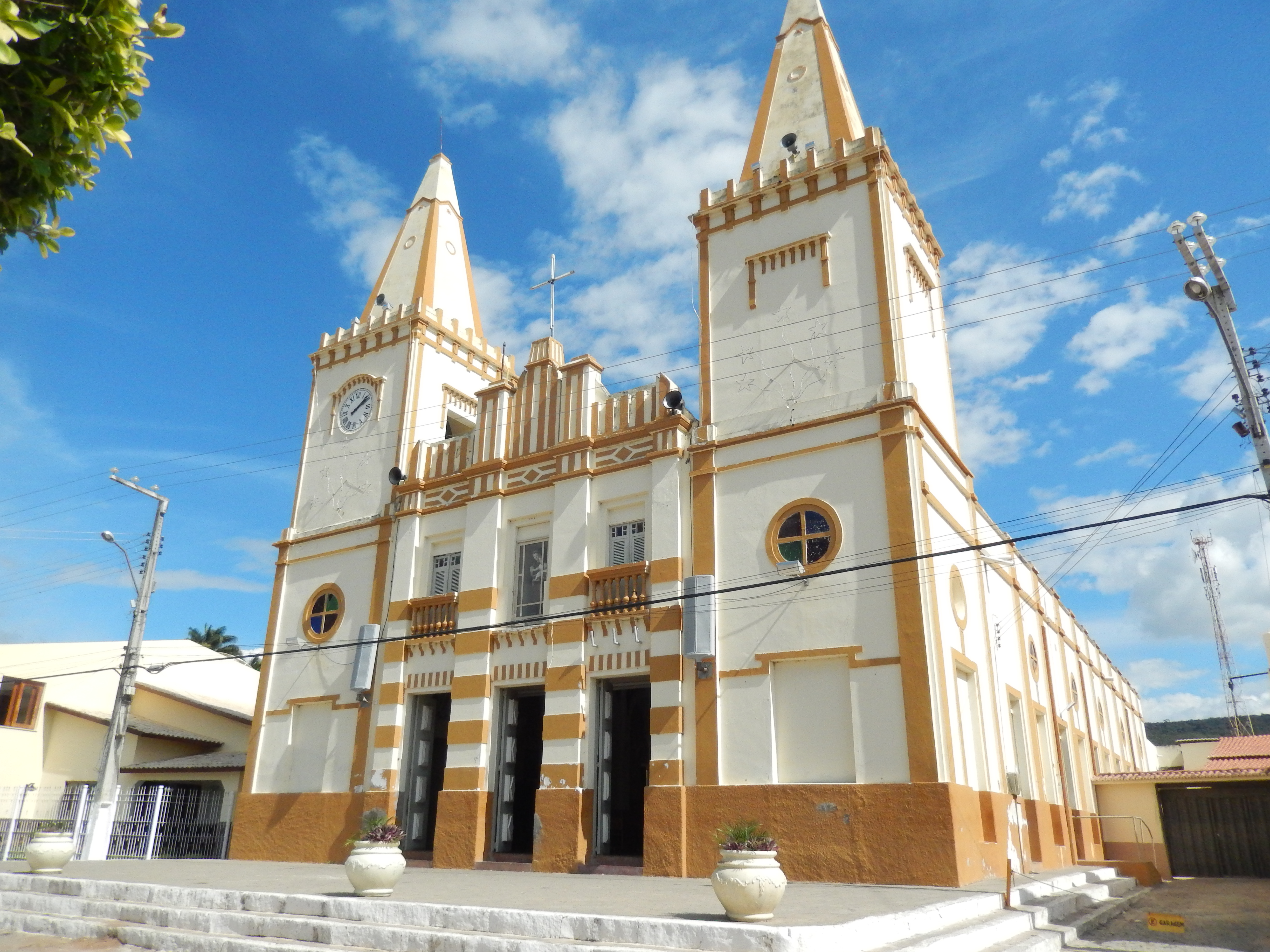 Igreja Matriz (paróquia de Santo Antônio), na cidade de Jardim, estado do Ceará.